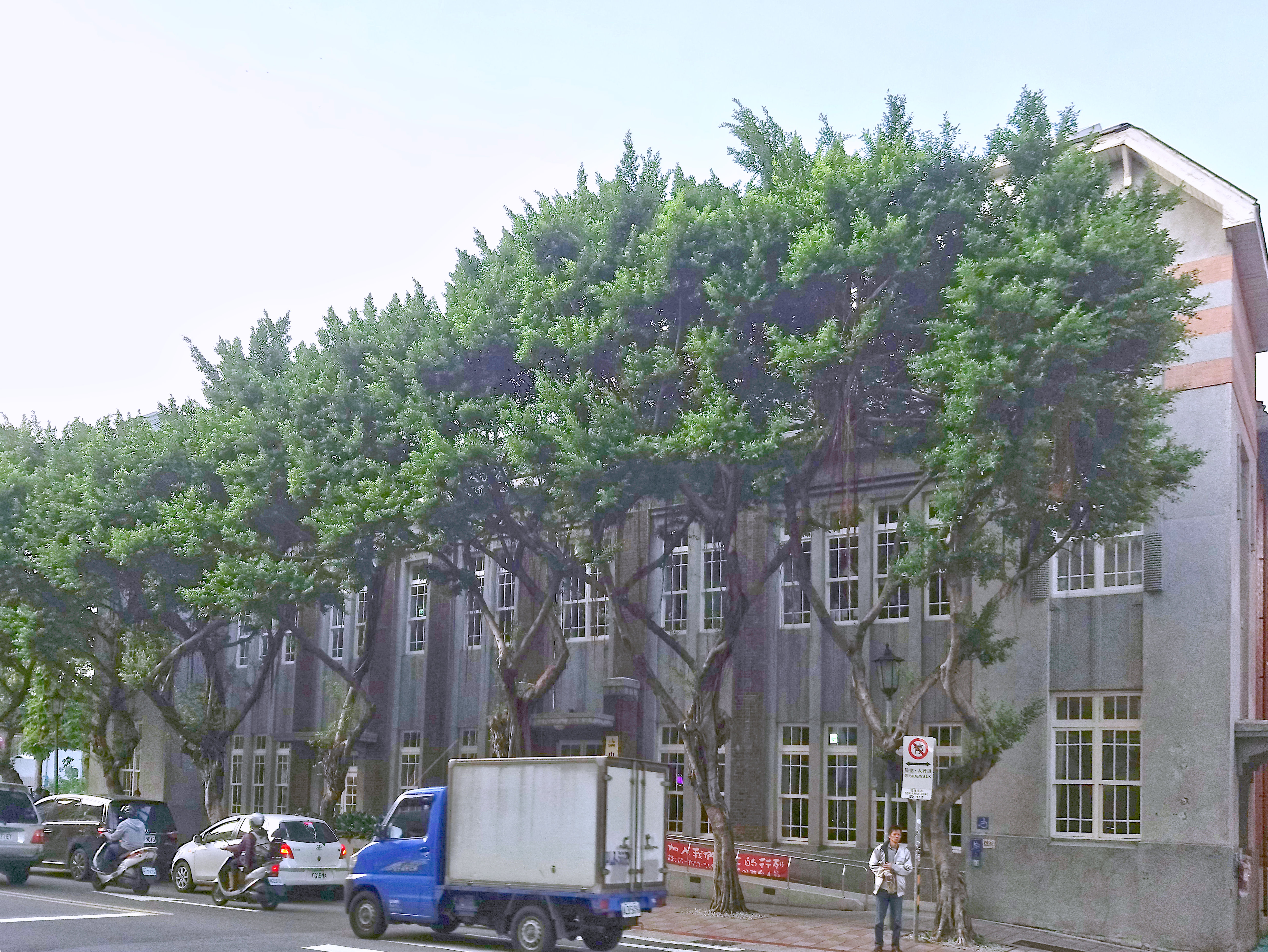 中山藏藝所(原臺北市政府衛生局),臺北市中山區林森次分區民安里